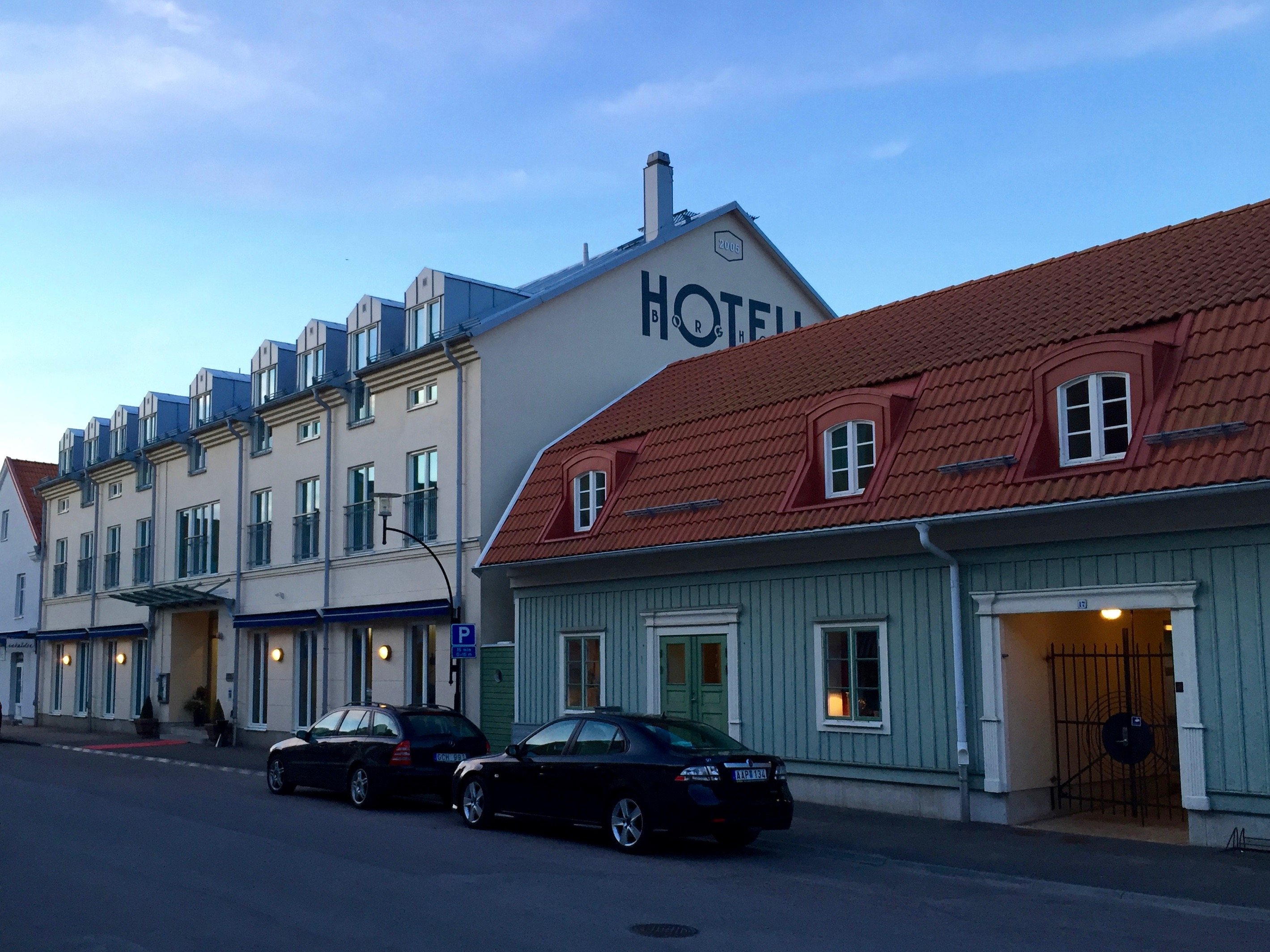 Hotell Borgholm